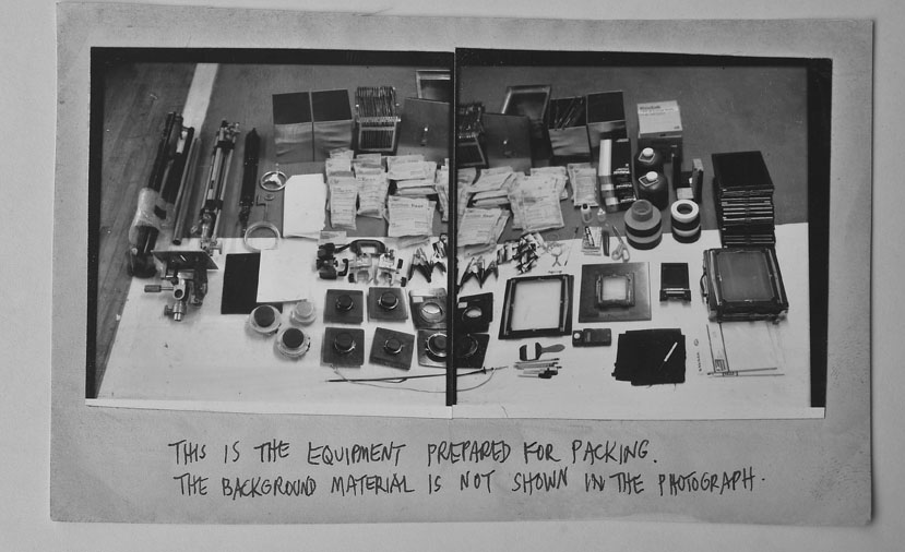 Pennova fotografická výbava, Praha, 1986, foto: Jiří Poláček. Photograph from Jiří Poláček´s archive.